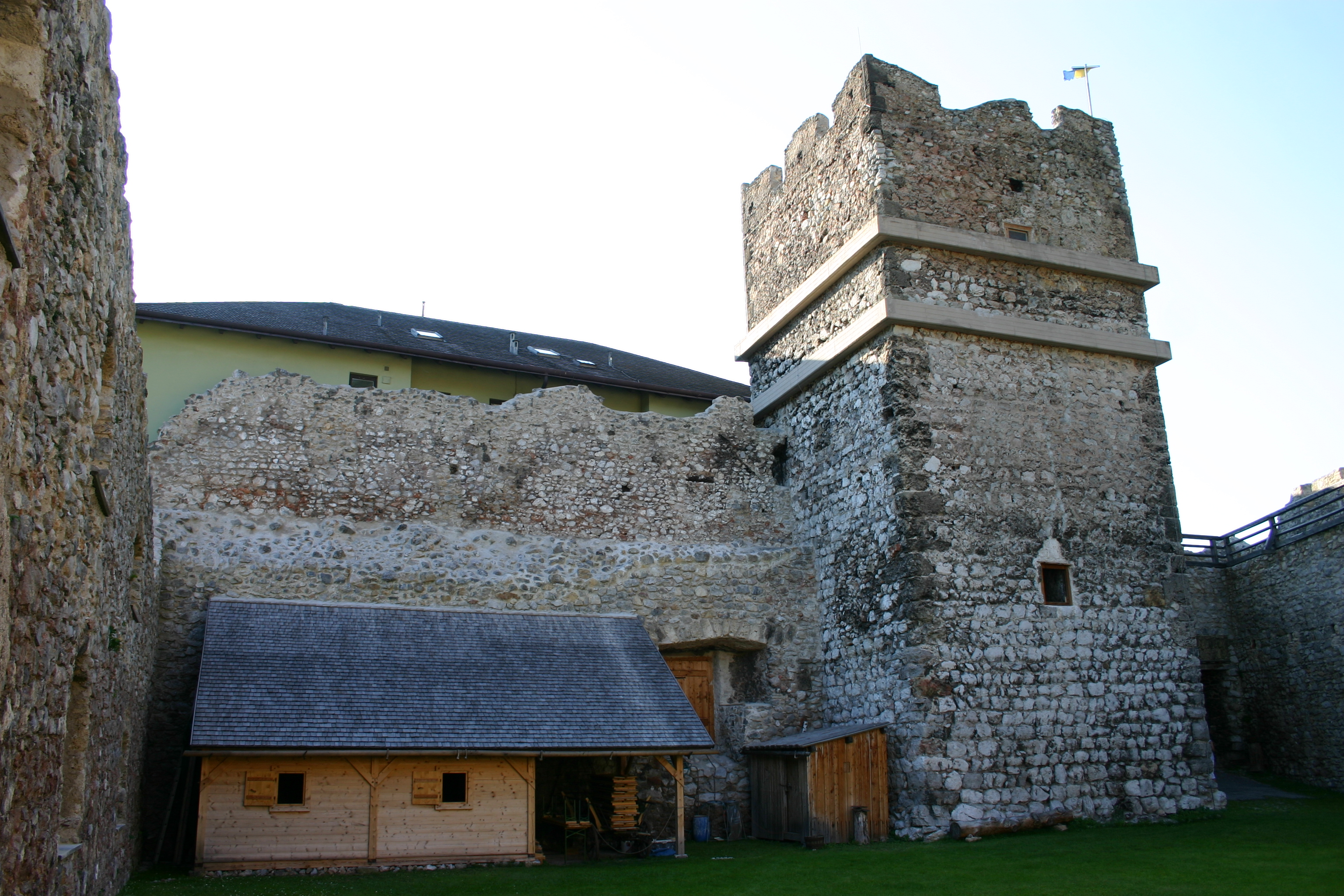 Puchberg am Schneeberg Burghof (Bild 1)